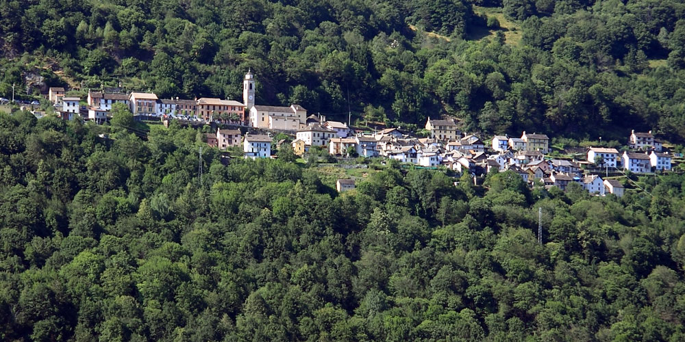 Panorama di Cursolo, Cursolo-Orasso (VB)